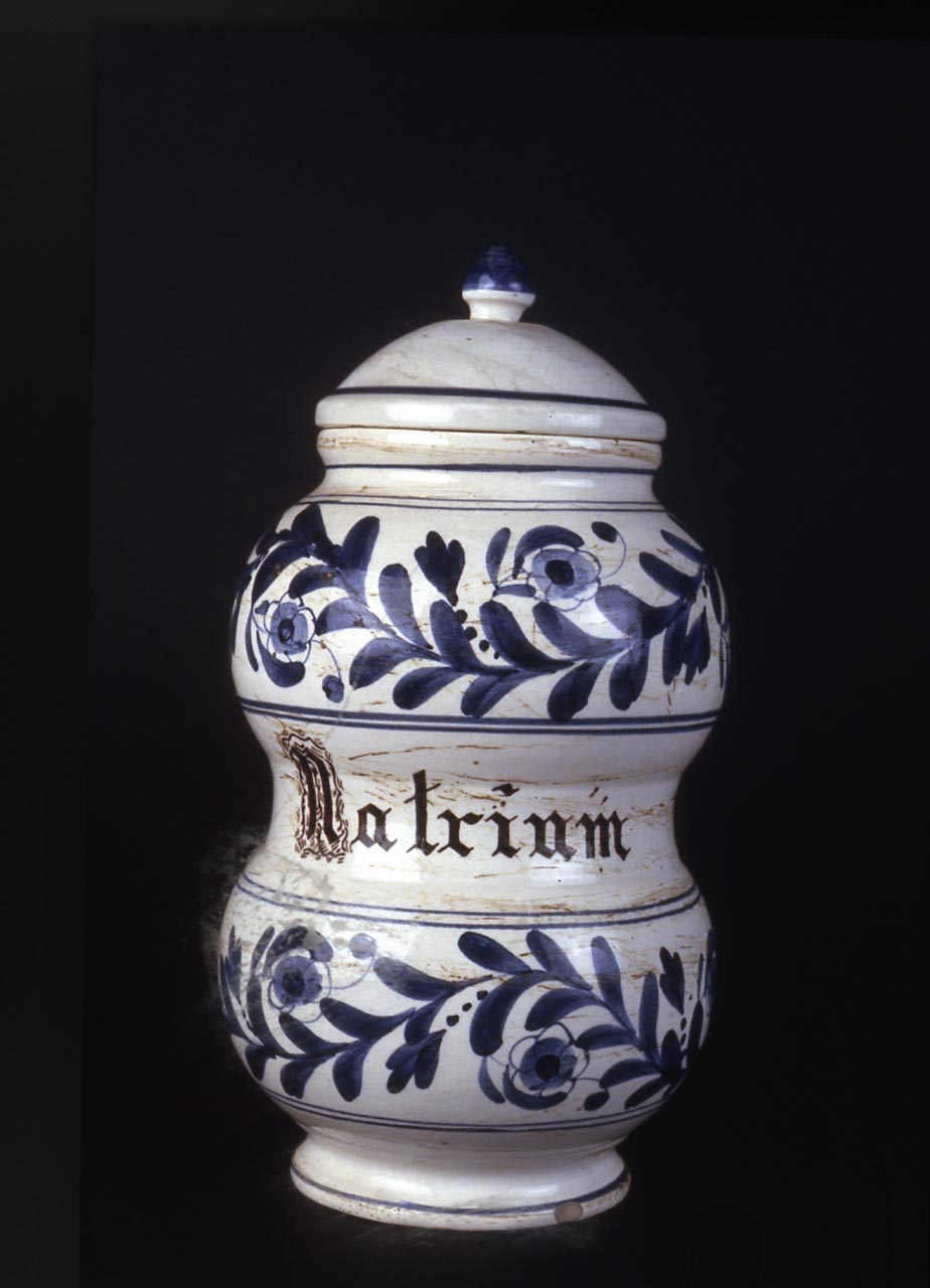 Vaso a rocchetto con spalla e base molto arrotondate e forte strozzatura al centro piede basso e piano, appena distinto da strozzatura, variante tarda dell'albarello a rocchetto. Il collo breve, di forma cilindrica, termina in una imboccatura con orlo piano. Coperchio a cupola con presa arrotondata. Funzione Vaso usato in farmacia per contenere un principio attivo, un essenza o altro. La dicitura sul corpo del vaso indica il nome del contenuto: "Natrium". Notizie storico-critiche Il decoro è molto comune nelle manifatture venete a partire già dai primi anni del XVIII secolo. Questo esemplare ha struttura molto vicina alla tradizionale forma a rocchetto, ma con accentuazione della rotondità della spalla e abbandonando il tradizionale piede a calice. La tecnica, molto corsiva, e la qualità del biscotto portano la datazione al periodo compreso tra la fine del secolo XIX ed il primo trentennio del secolo XX.